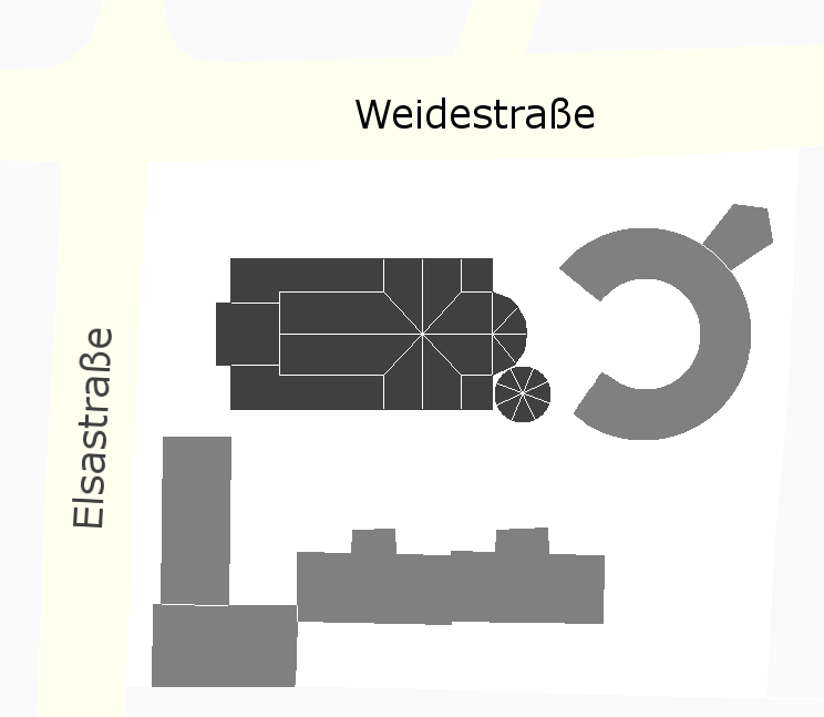 St. Sophien in Hamburg-Barmbek, schematisierter Lageplan. Im Uhrzeigersinn, beginnend an der Ecke Weidestraße / Elsastraße: Kirche, Kloster, Sophienschule, Turnhalle, Kindergarten. This is a photograph of an architectural monument. ,19550,19951